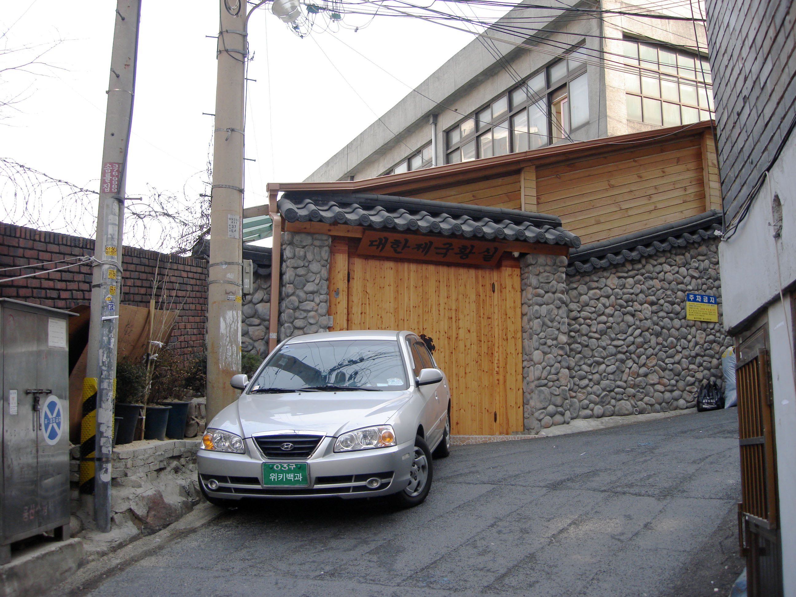 서울 용산구에 있는 대한제국 황실. 자동차 번호판을 가리기 위해 '위키백과'라는 글자 삽입.